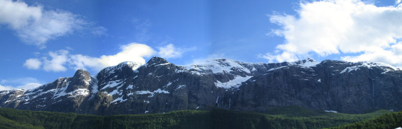 Hellefjellet sett fra fjorden